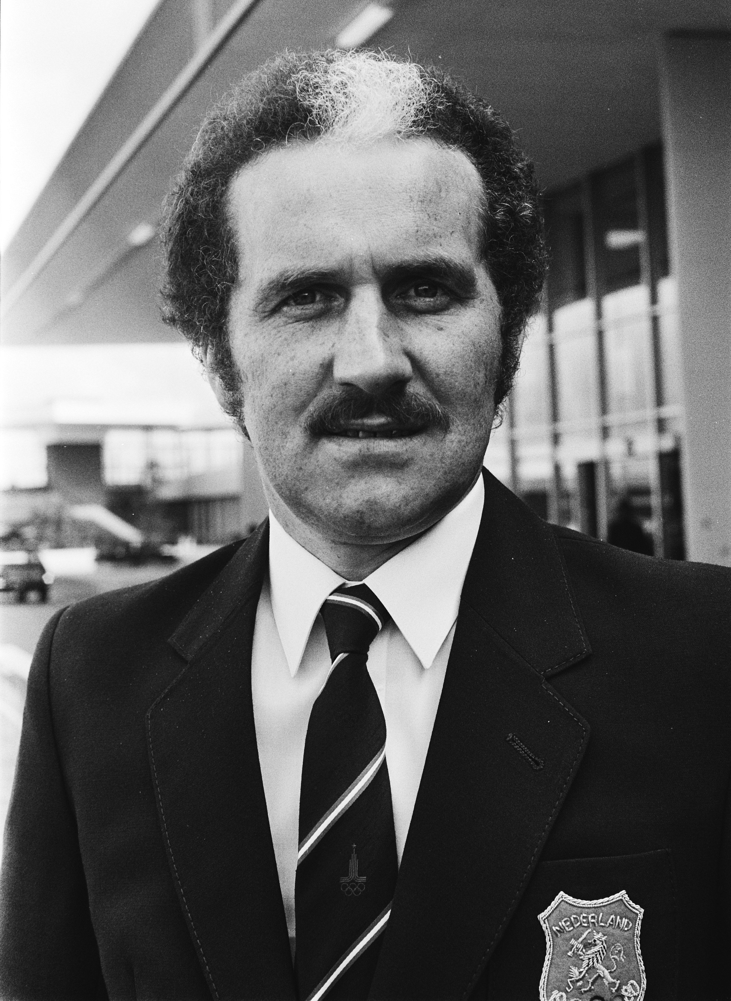 Marinus Wagtmans avant le départ de l'équipe cycliste olympique néerlandaise pour les Jeux Olympiques d'été 1980 de Moscou.